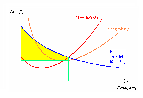 Illusztráció az árdiszkrimináció cikkhez